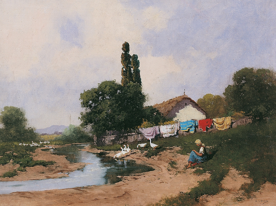 Paisaje con gansos